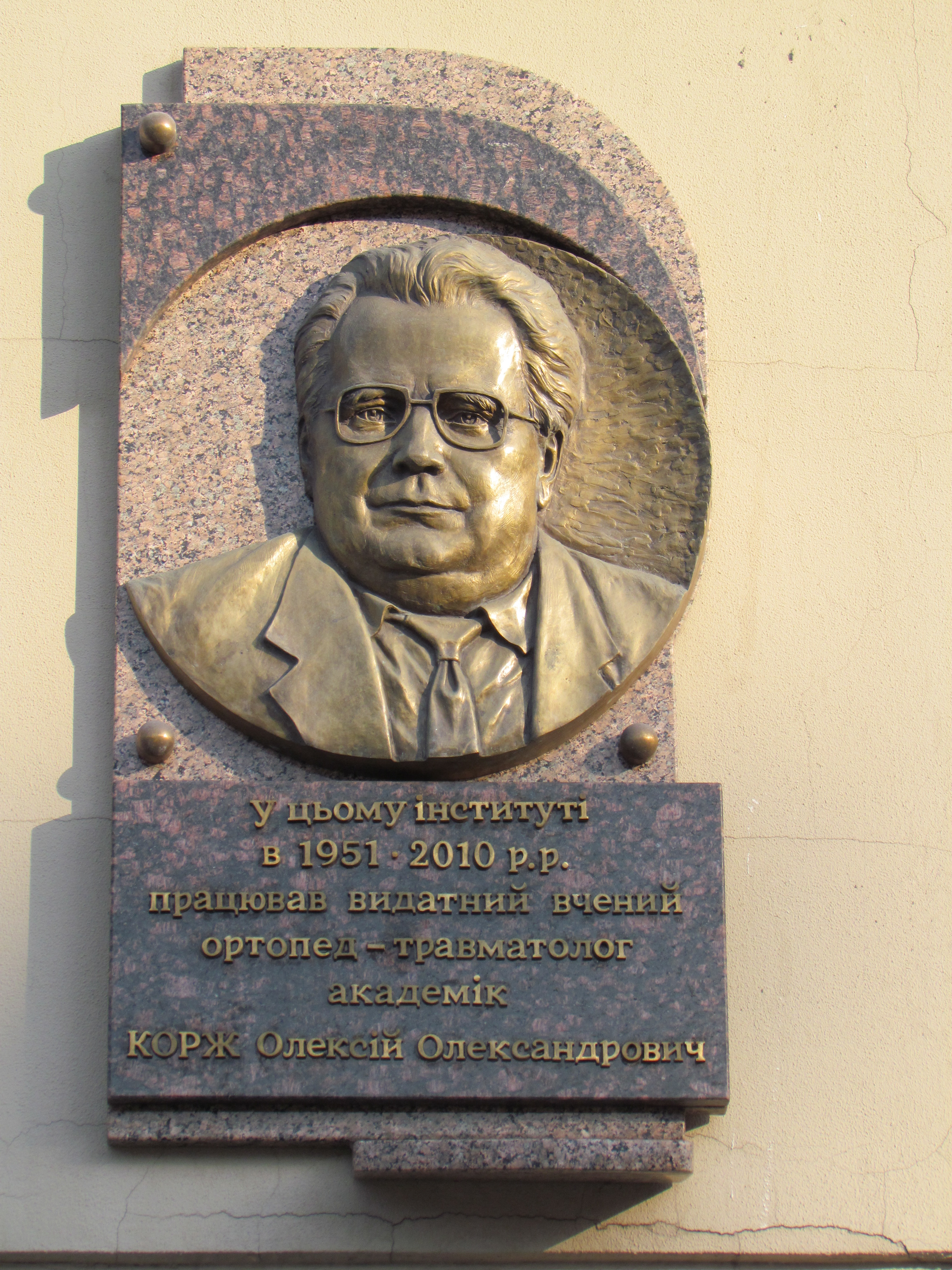 Україна, Харків, вул. Пушкінська, 80